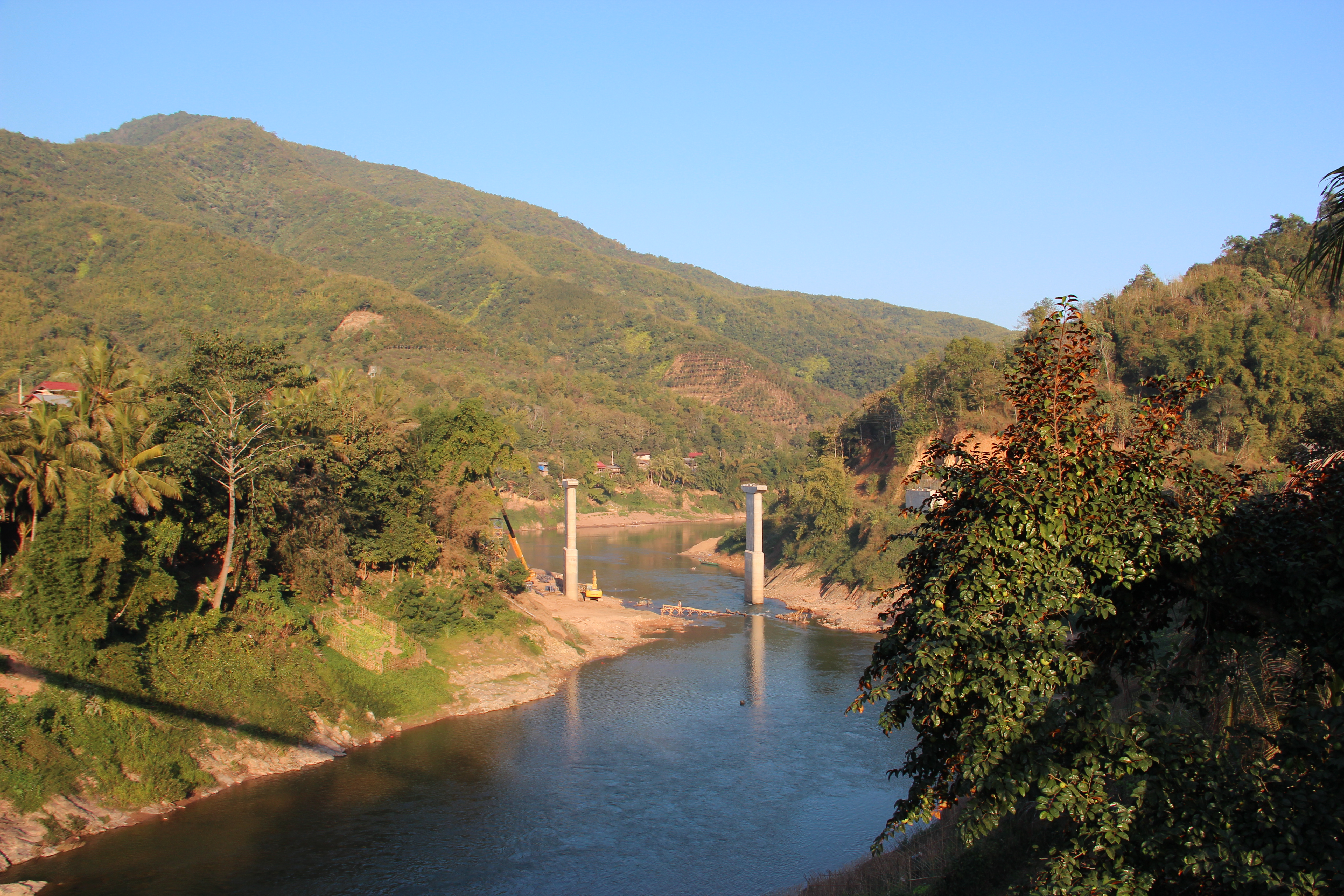 Pont en construction au dessus de la Nam Ou à Muang Khua (province de Phongsali, Laos).